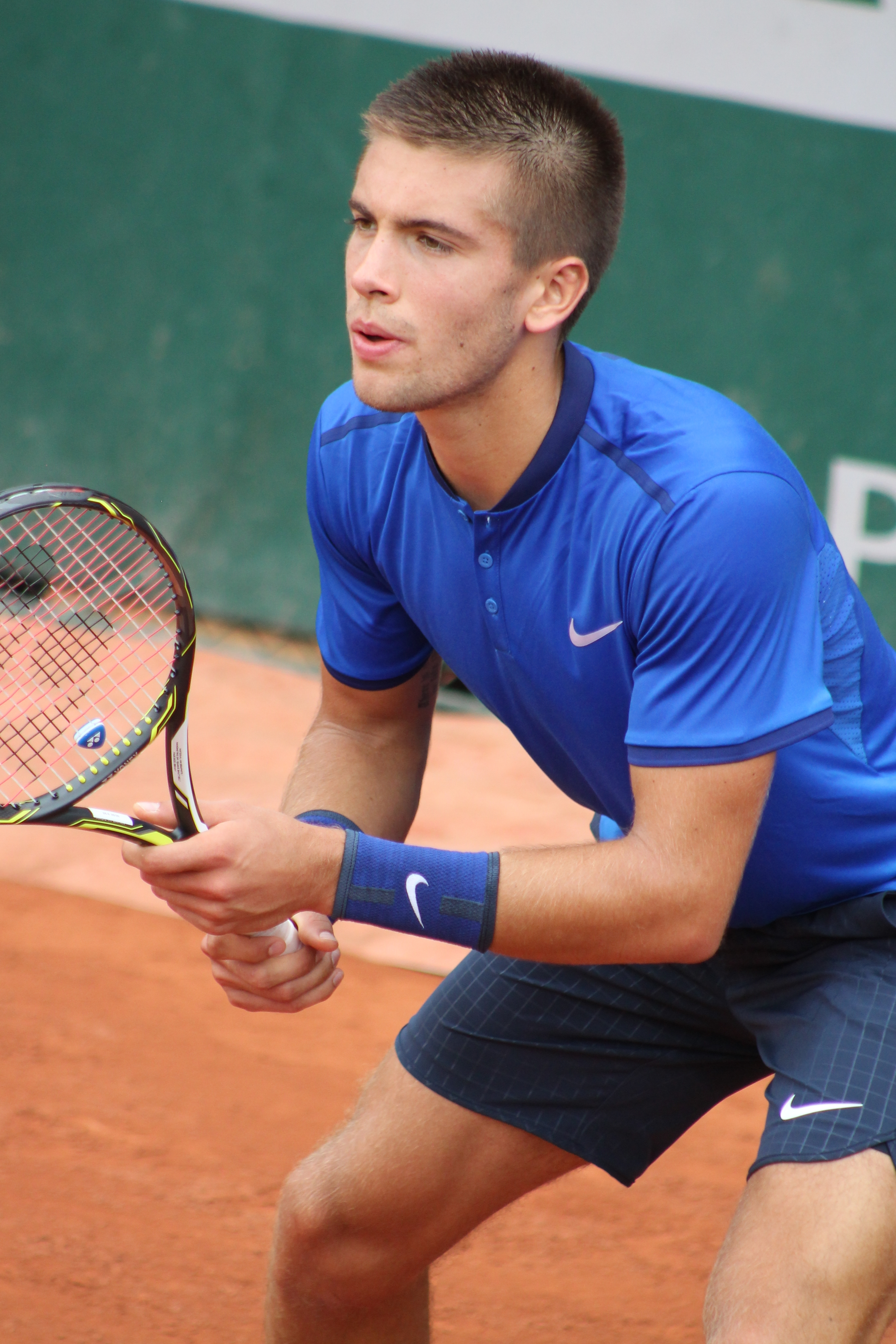 Coric RG16 (14)